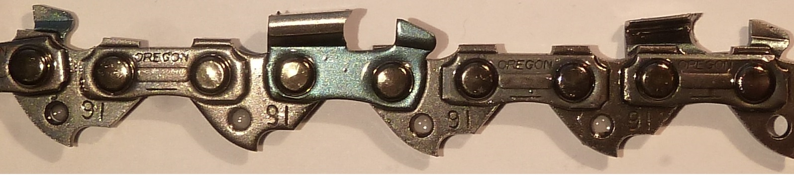 3/8, 1,3 mm, Serie 91VXL